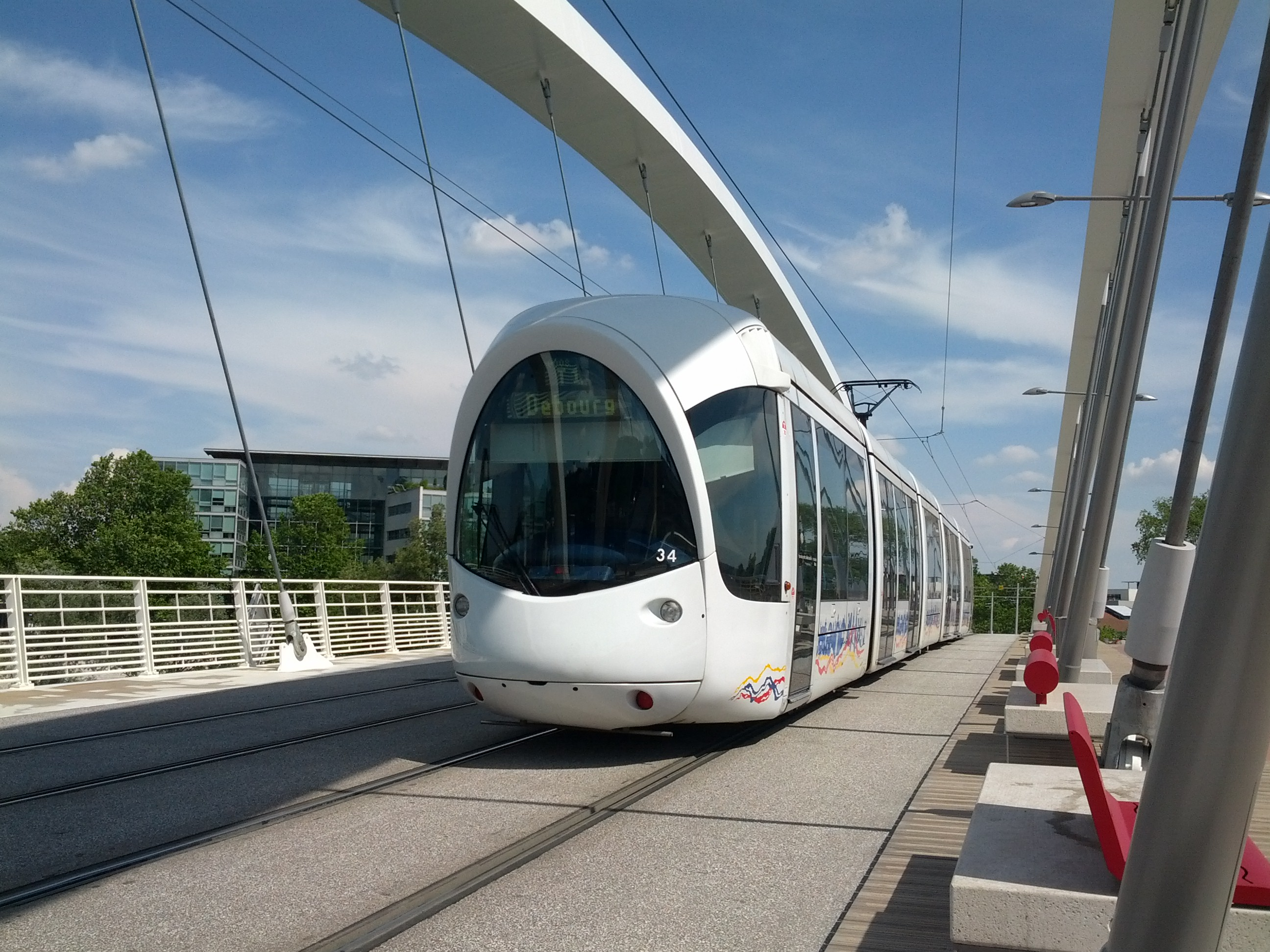 Rame Citadis 302 du tramway T1 de Lyon sur le pont Raymond-Barre